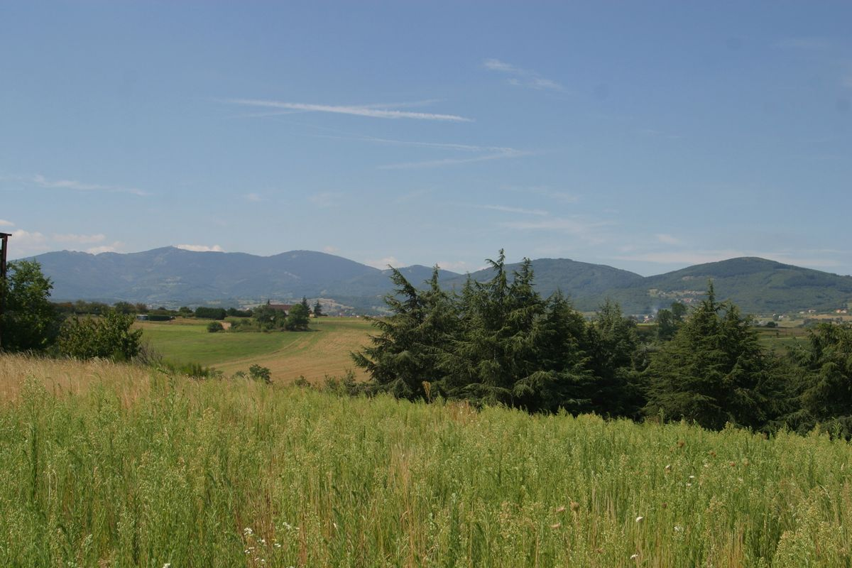 Ligne de crêts depuis le Piémont rhodanien (ici Pélussin)